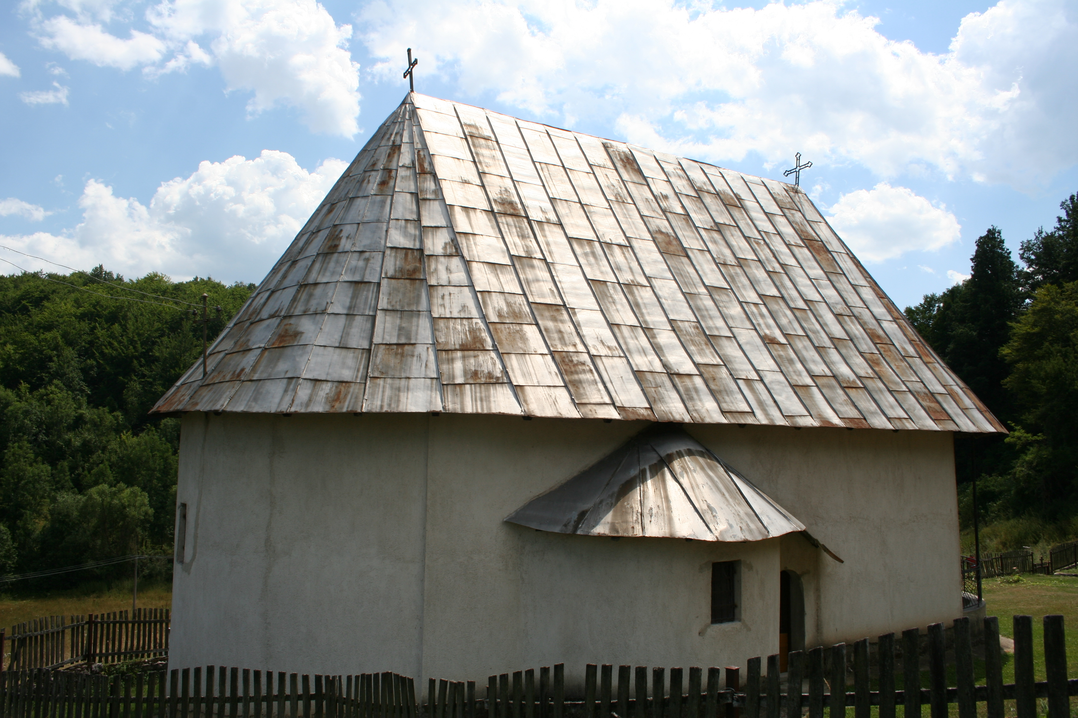 Crkva Sv. Gavrila u Staparima